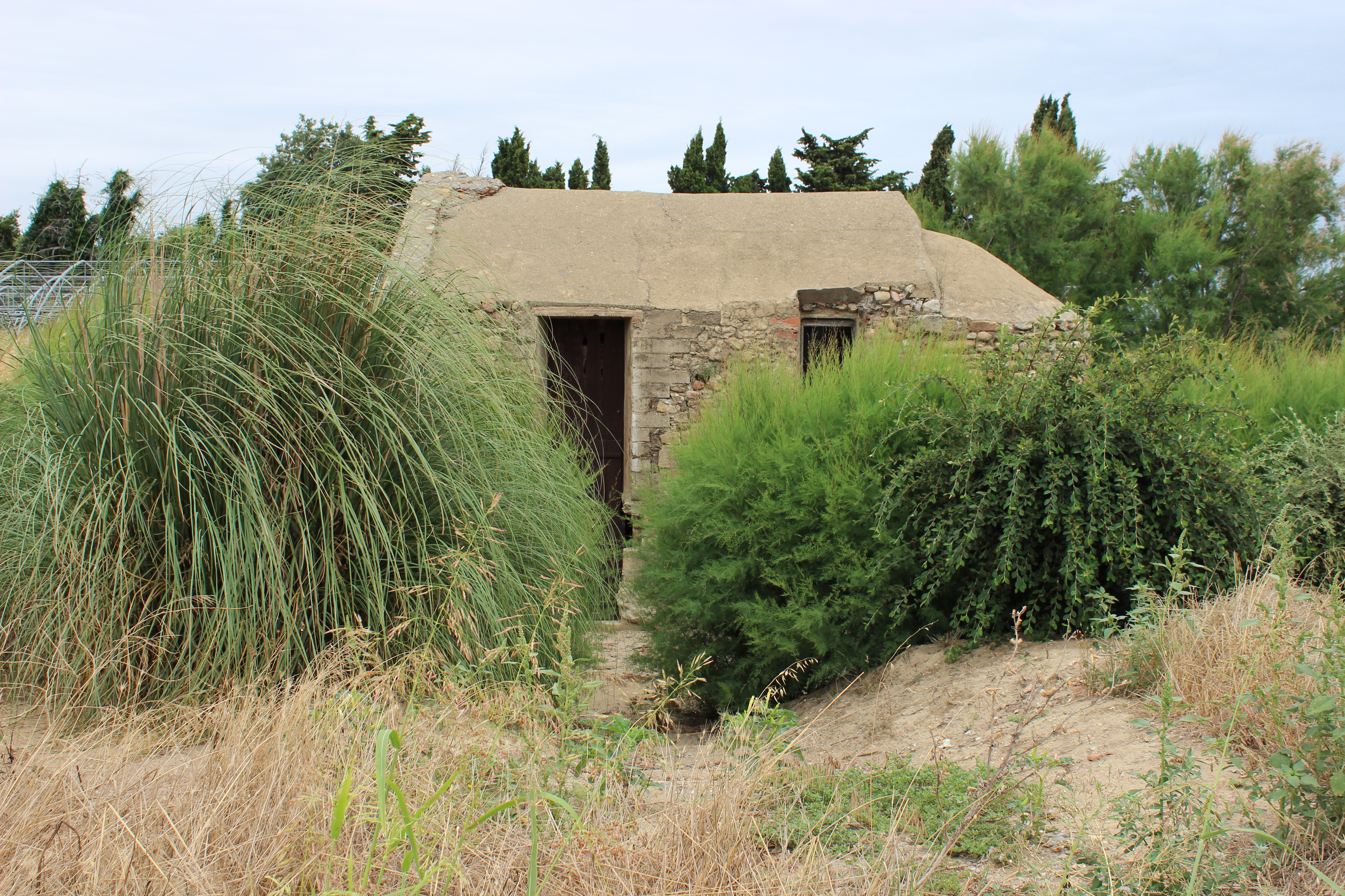 Église Sainte-Eugénie de Tresmals dans les fourrés vue du sud